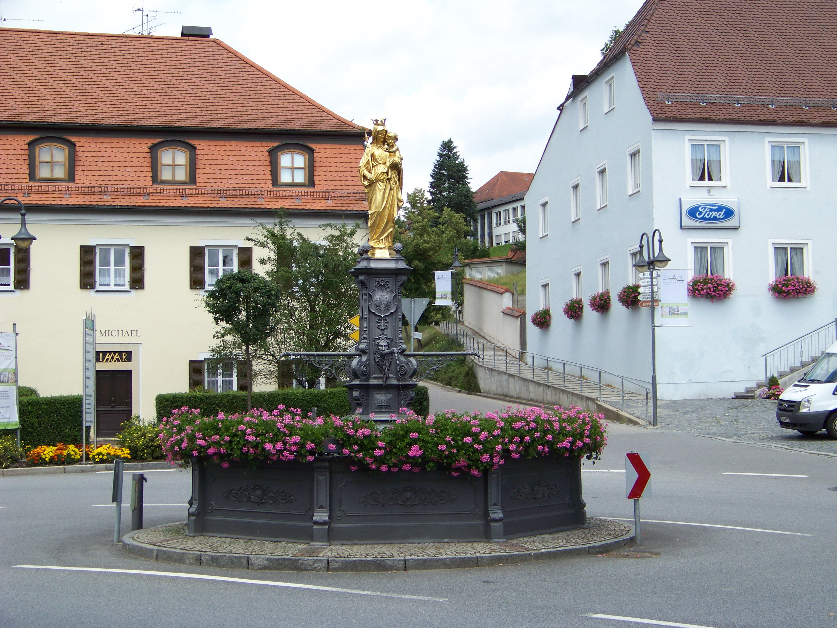 Mallersdorf-Pfaffenberg. Marienbrunnen an der Hofmark in Mallersdorf. Der Brunnen mit der Mariensäule wurde als Abschluss und Denkmal der Wasserleitung am 29. Mai 1904 durch Superior Ferstl eingeweiht.